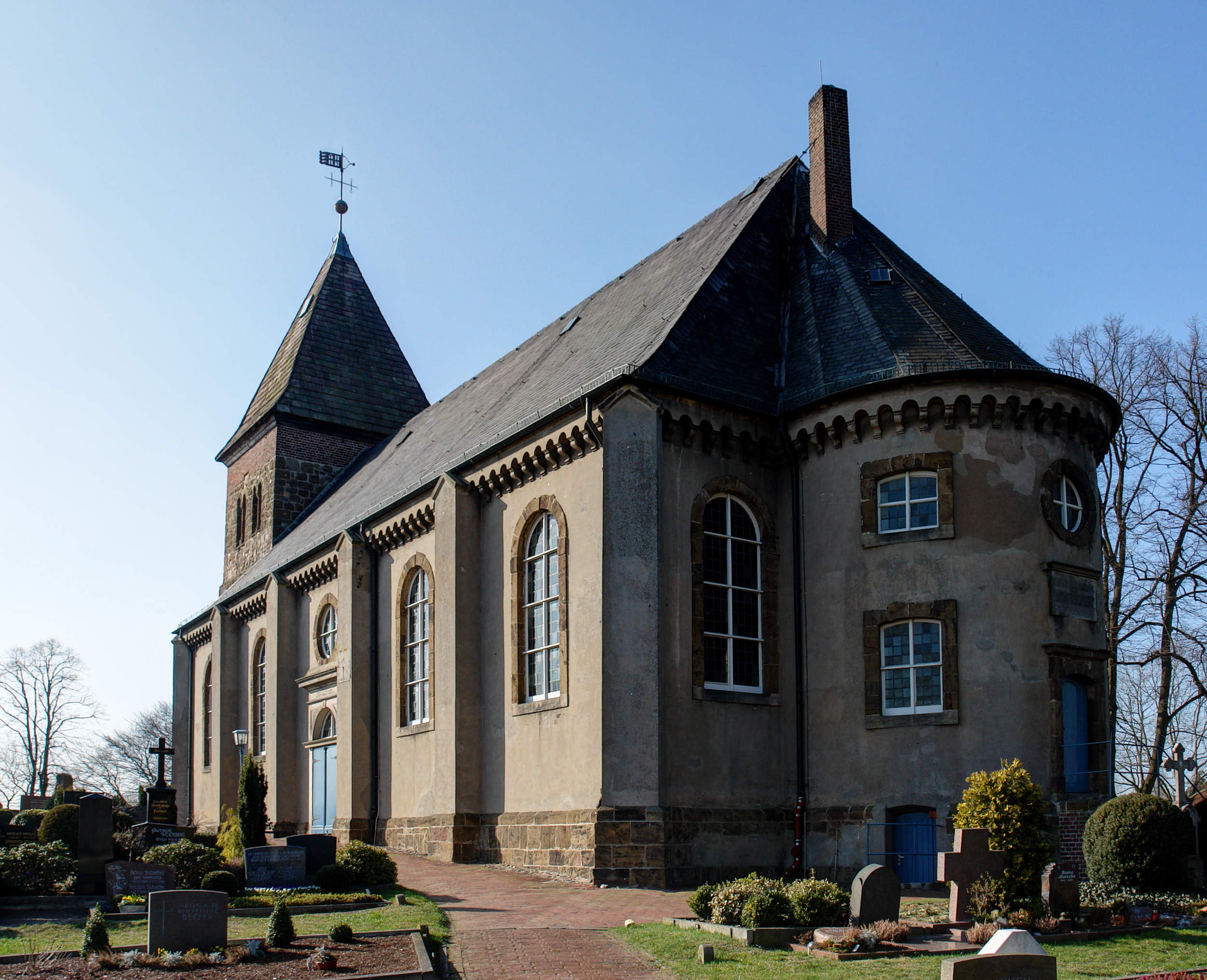 St. Johann der Evangelist in Bremen, Arberger Heerstraße 69Das abgebildete Objekt ist ein geschütztes Kulturdenkmal in der Freien Hansestadt Bremen, mit der Nr. 0088 beim Landesamt für Denkmalpflege registriert.